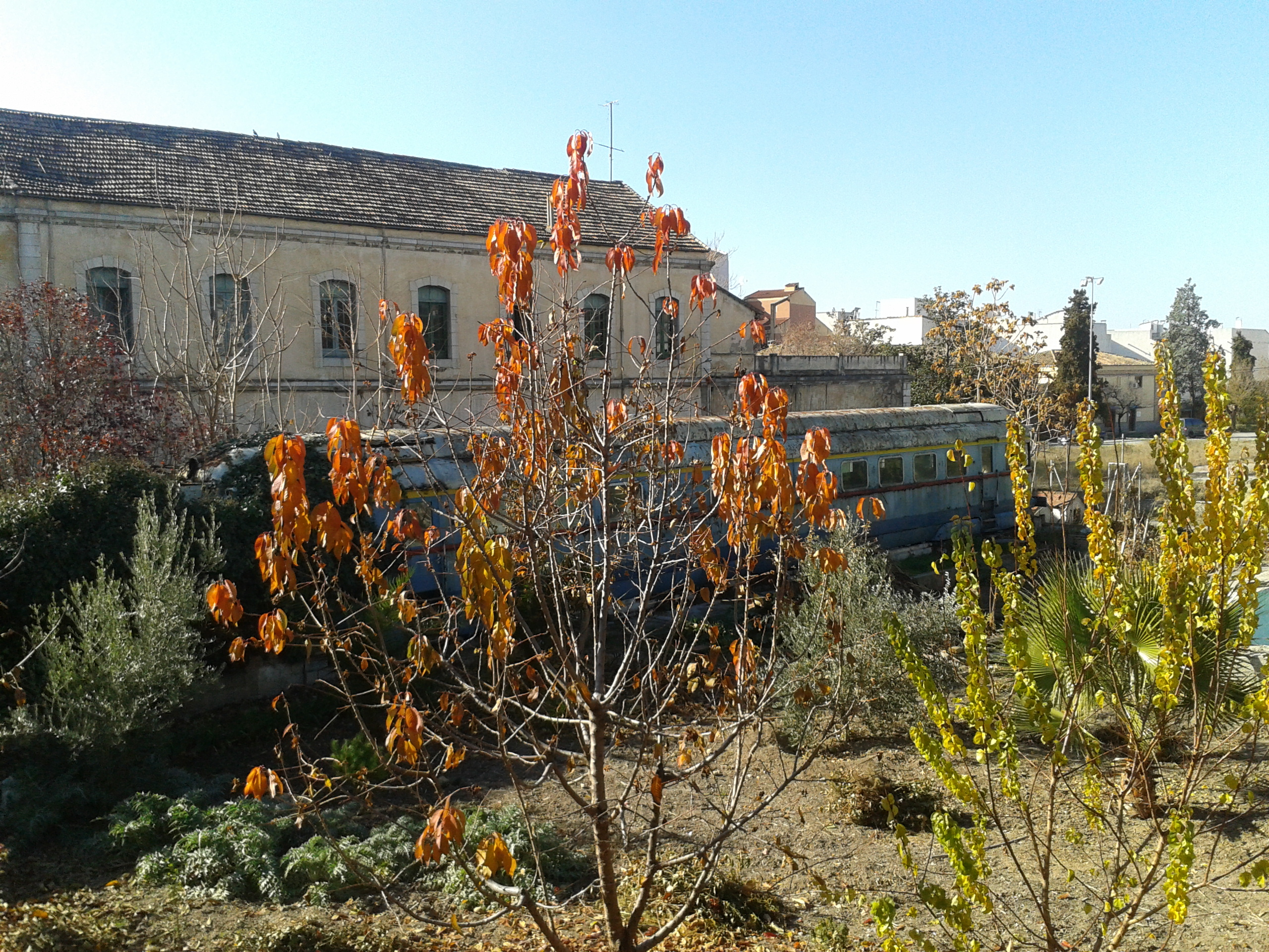 Tren en vía muerta de los depósitos y talleres de Renfe en la antigua Estación del Sur de Granada